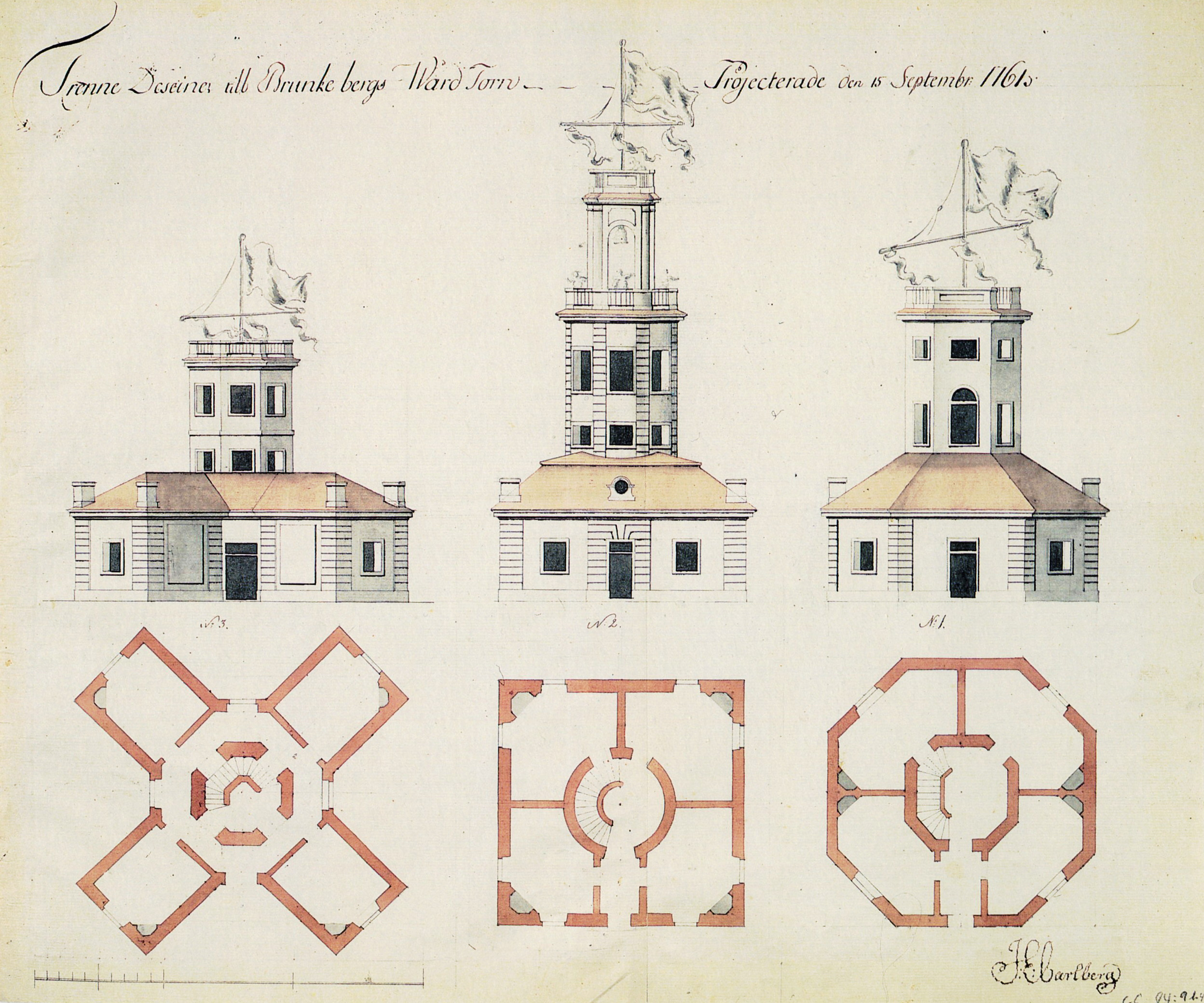 Trenne Designer till Brunkebergs Wård Torn, sign. Johan Eberhard Carlberg (stadsarkitekt)